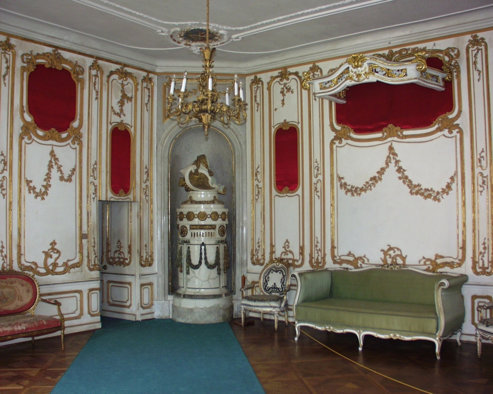 A fertődi Esterházy-kastély egyik terme